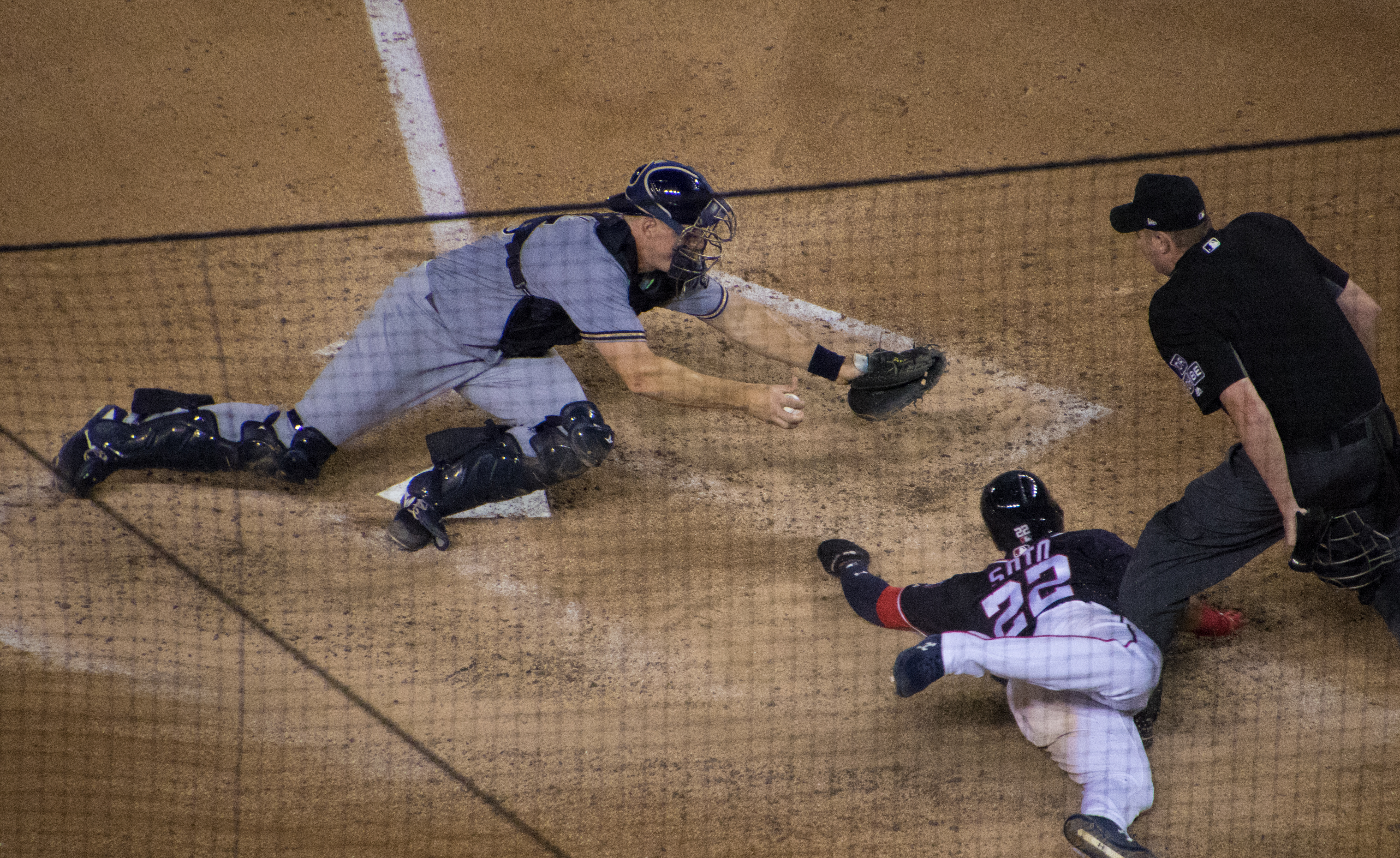 Erik Kratz and Juan Soto